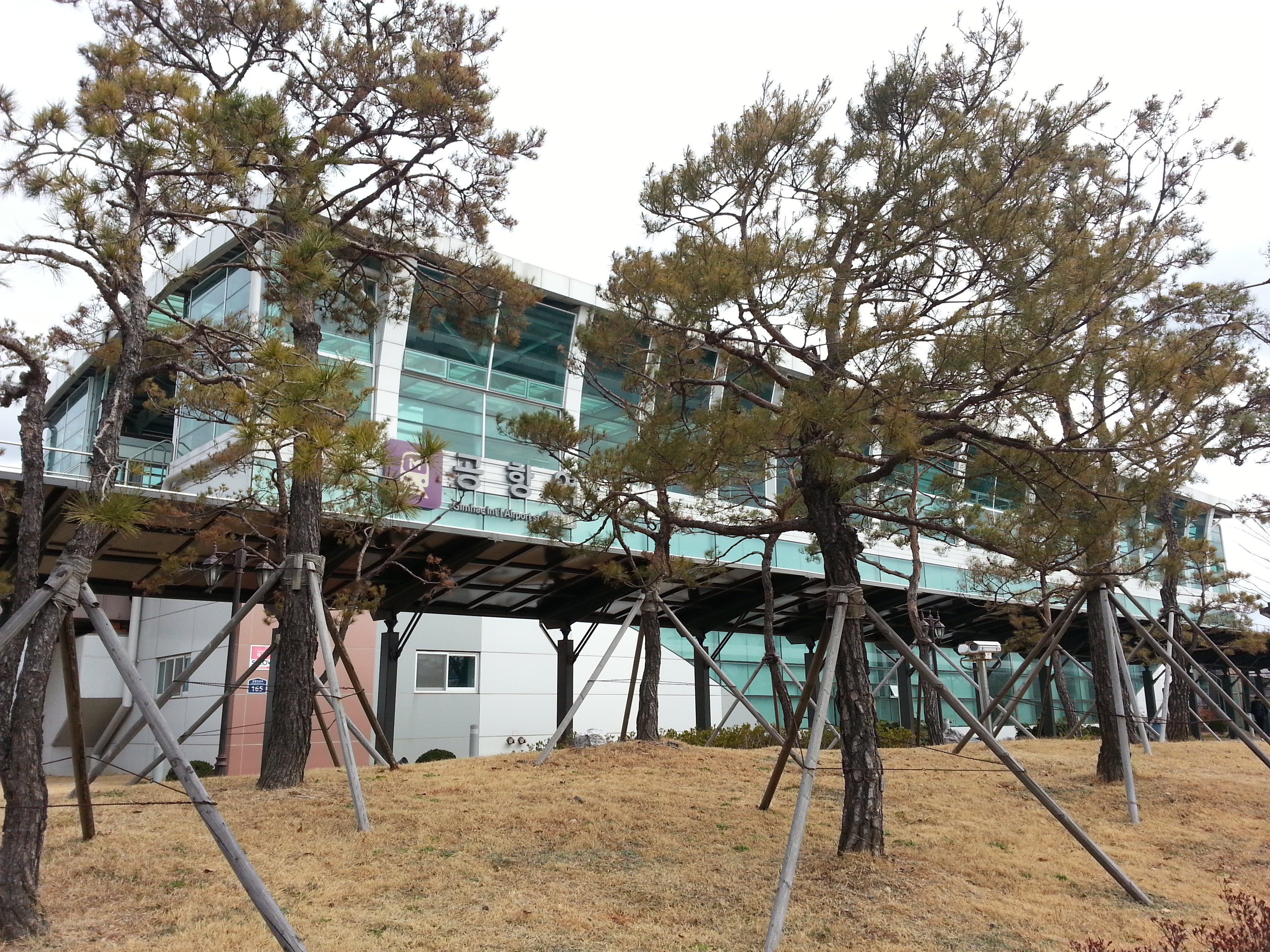 釜山－金海軽電鉄空港駅正面。